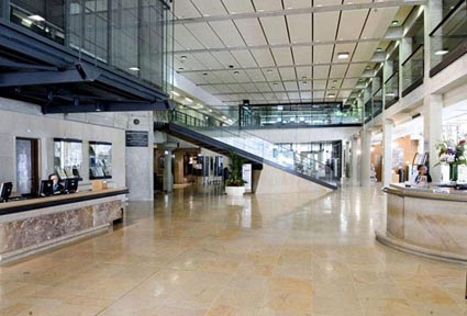 Hall d’accueil du centre d'accueil et de recherche des Archives nationales (Caran). Architecte Stanislas Fiszer. Paris, rue des Quatre Fils.